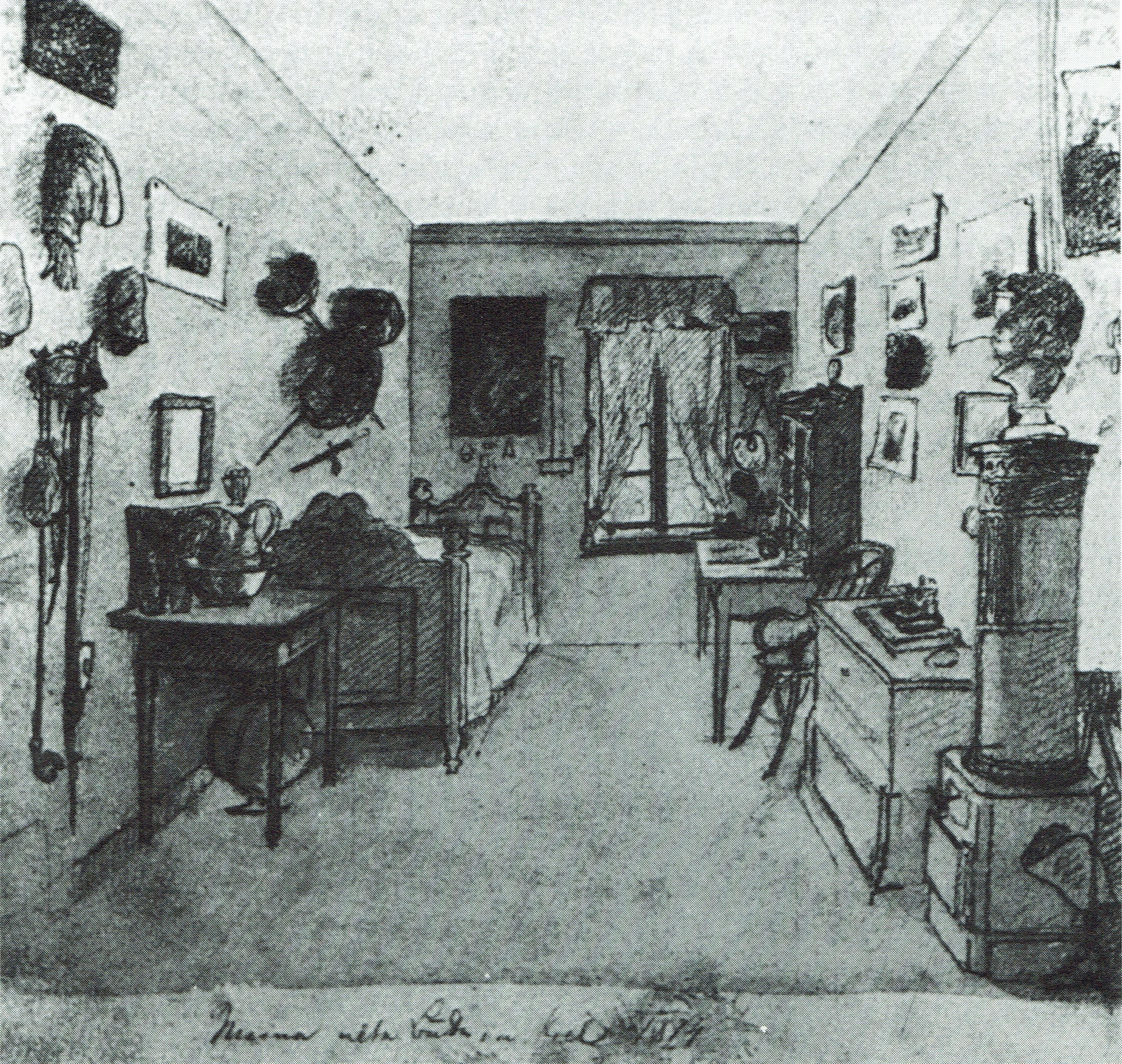 Oldes Schülerzimmer - "Meine alte Bude in Kiel"